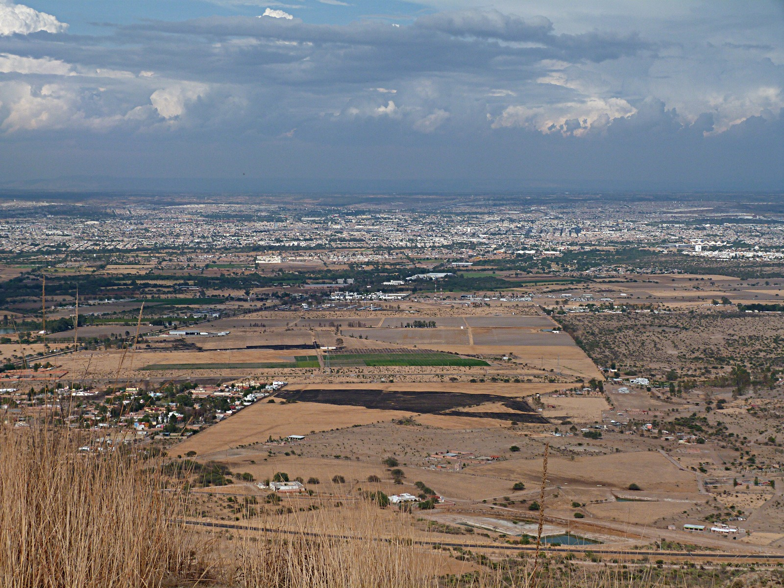 Ciudad de Aguascalientes desde el picacho